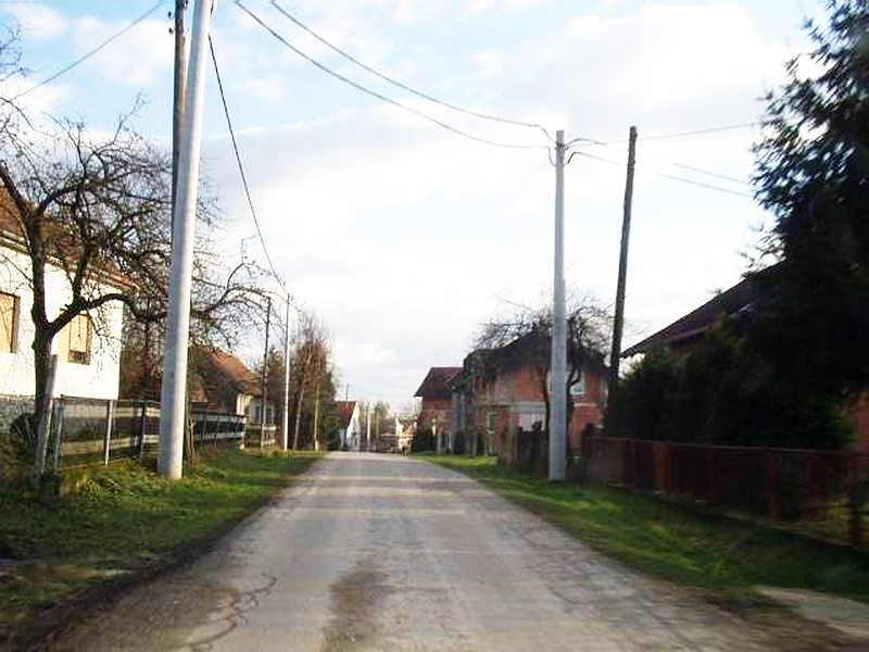 Djivan - Hauptstrasse